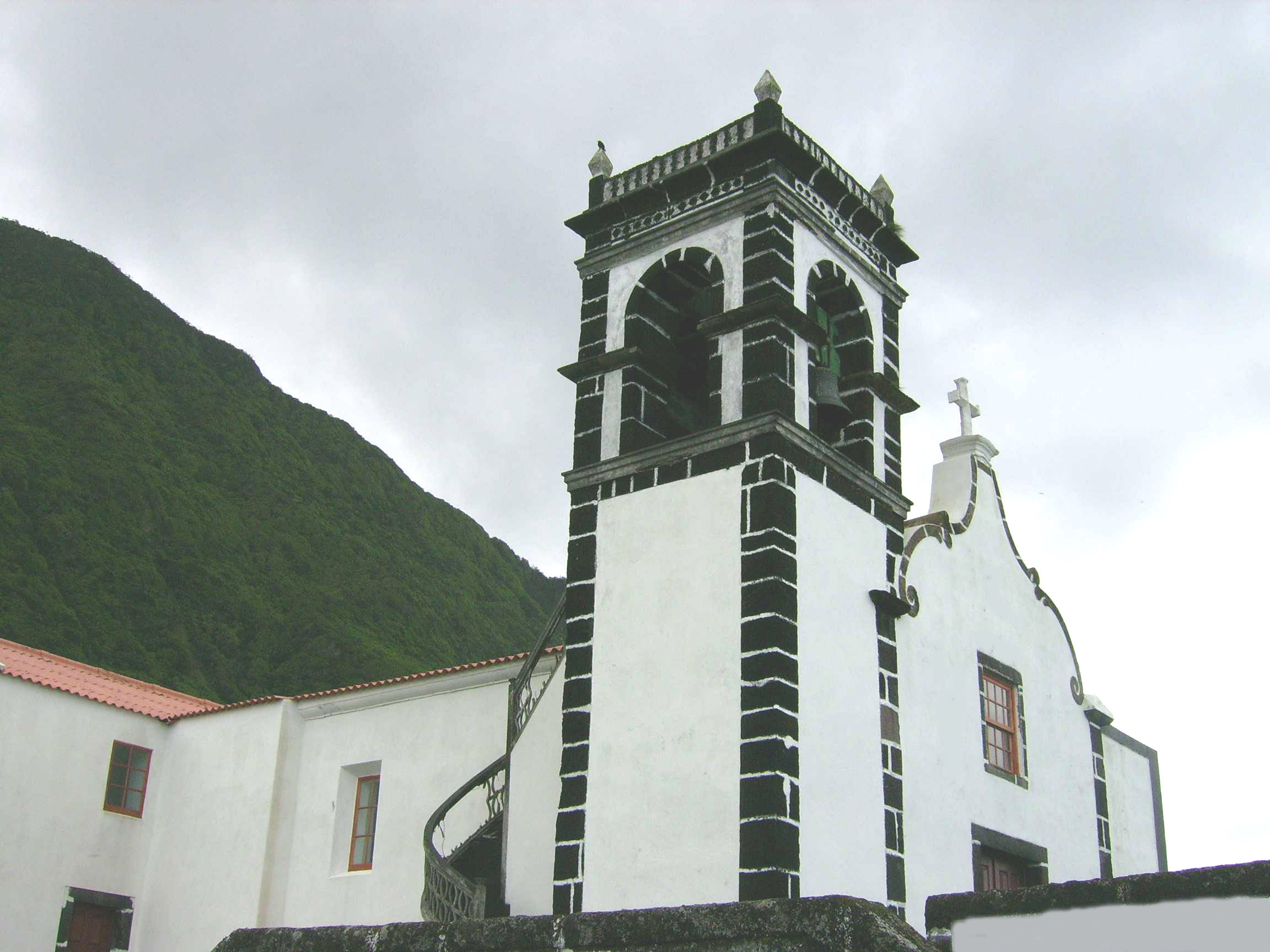 Church of Santo Cristo, located in the Fajã da Caldeira de Santo Cristo, Ribeira Seca, Calheta, São Jorge (Azores), Portugal